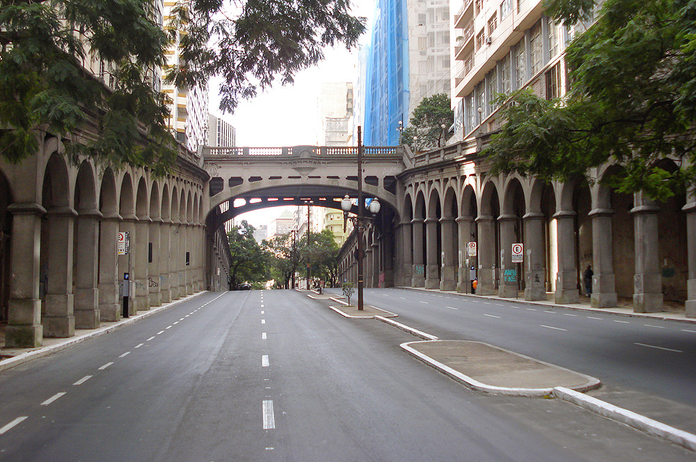 Viaduto Otávio Rocha, Porto Alegre, Brasil.